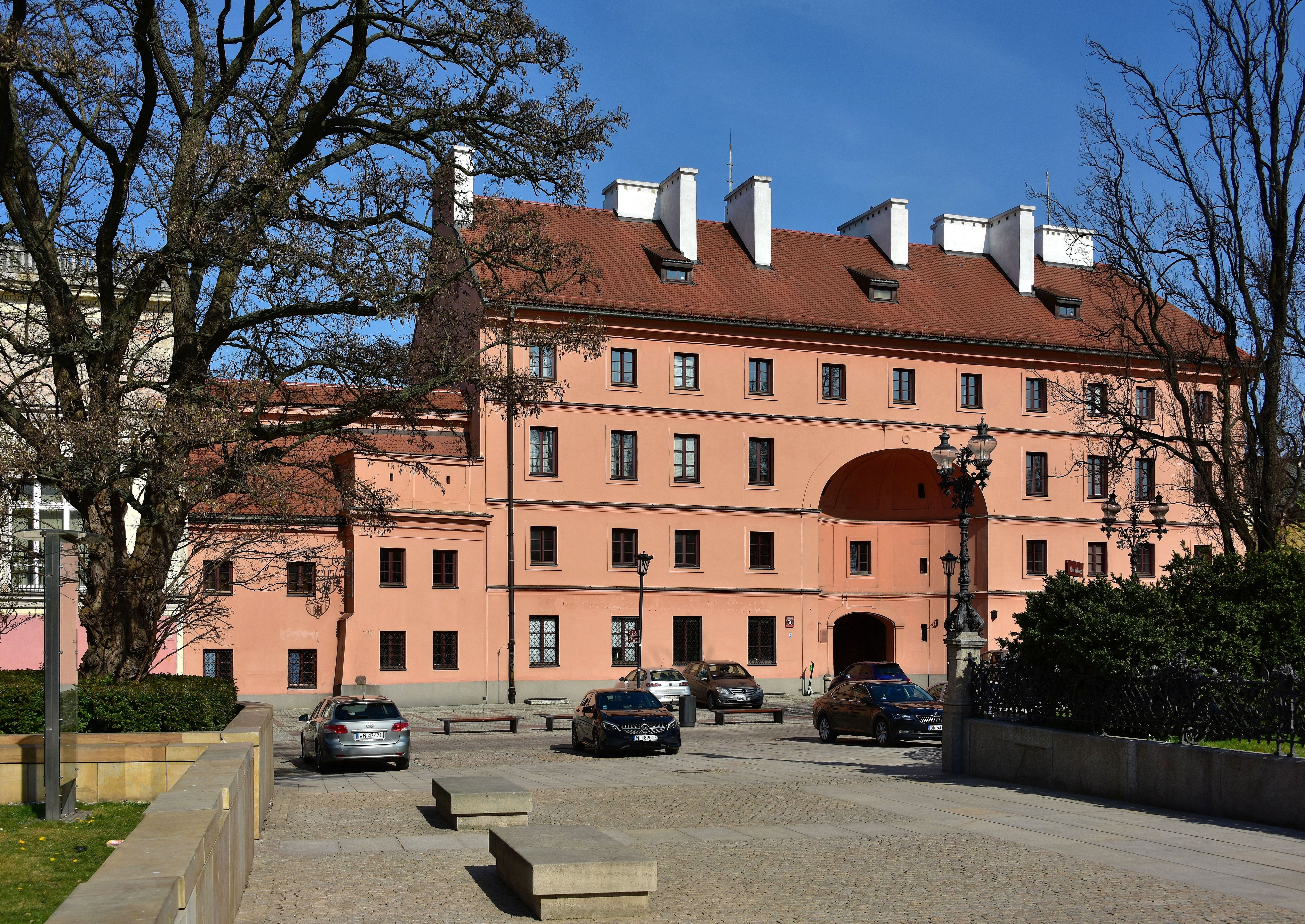 Zajazd Dziekanka przy ul. Krakowskie Przedmieście 56 w Warszawie